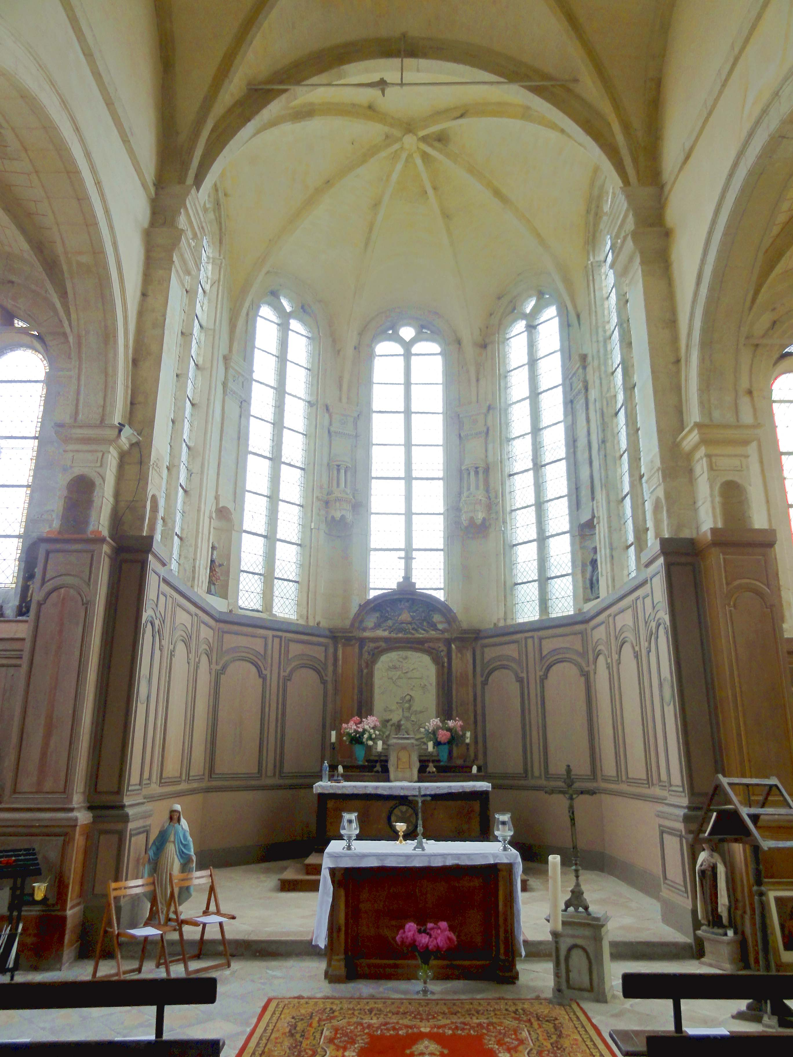 Abside.